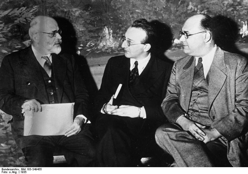 Fei, Hubertus Prinz zu Löwenstein, Salvemini 1935, Sitzung der Amerikanischen Akademie für Politische und Soziale Wissenschaften in New York. Von links: Mario A. Fei, Prinz Hubertus Löwenstein, Prof. Gaetano Salvemini. Zentralbild 3502-35 Acme Ho. [New York.- Mario A. Fei, Hubertus Prinz zu Löwenstein-Wertheim-Freudenberg und Prof. Gaetano Salvemini im Gespräch, sitzend] Abgebildete Personen: Löwenstein-Wertheim-Freudenberg, Hubertus Prinz zu: 1906-1984; Journalist, Historiker, MdB, FDP, DP, CDU, Deutschland